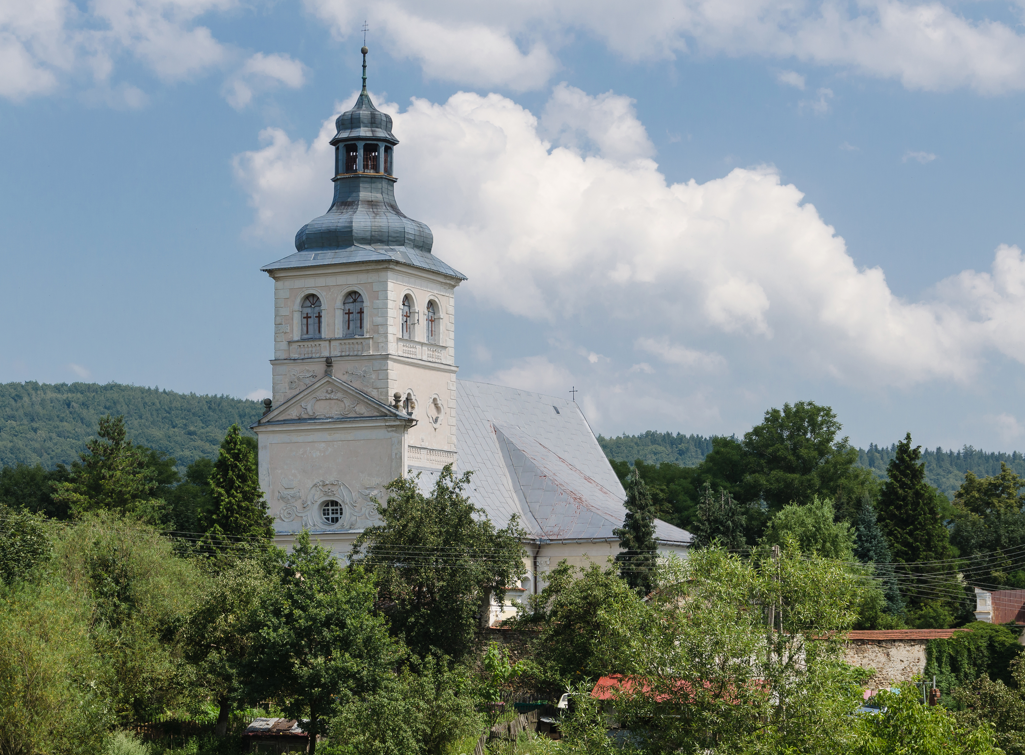 Gorzanów, kościół par. p.w. św. Marii Magdaleny, 1658, XVIII